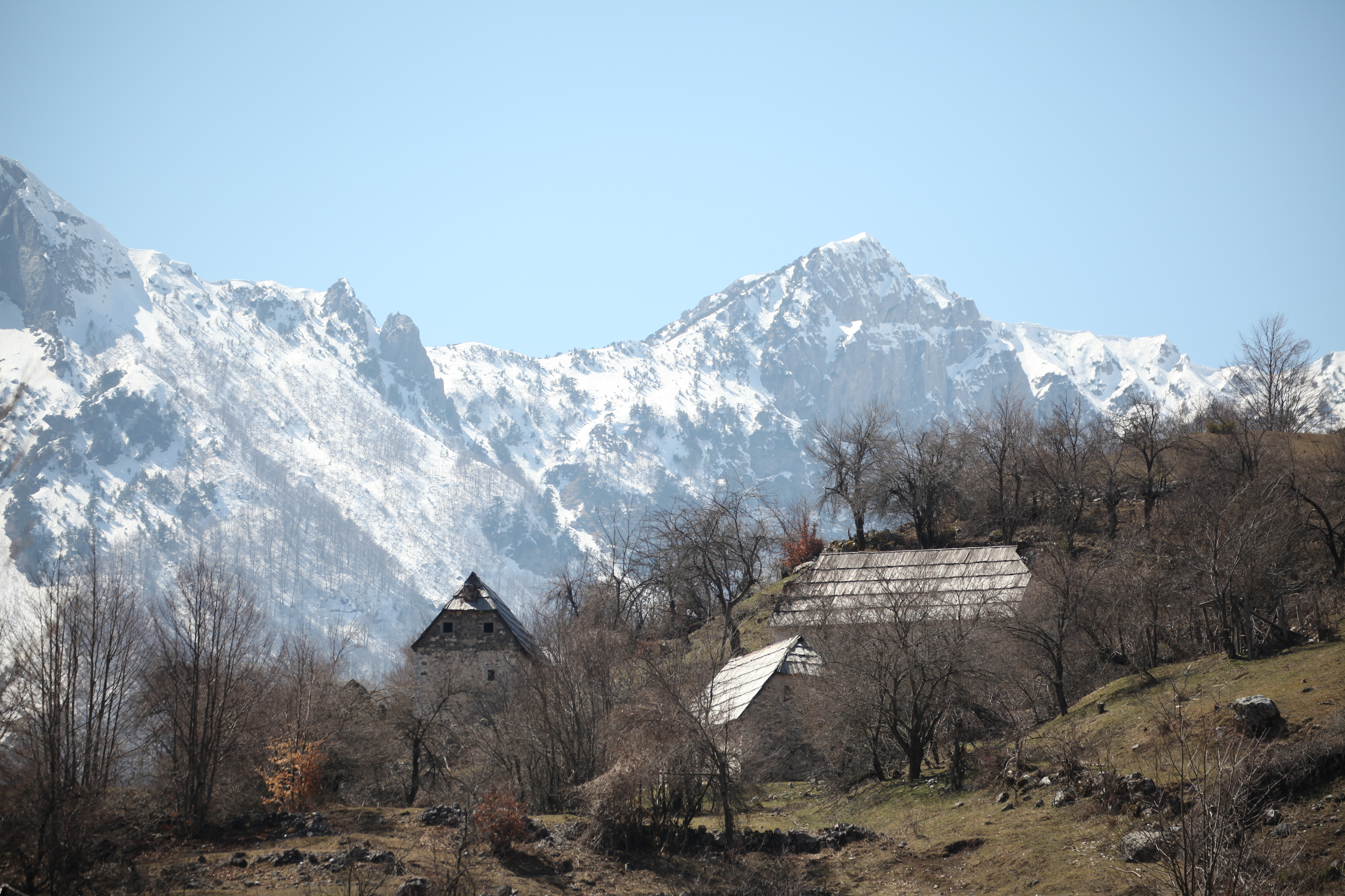 Bajram Curr, Albania